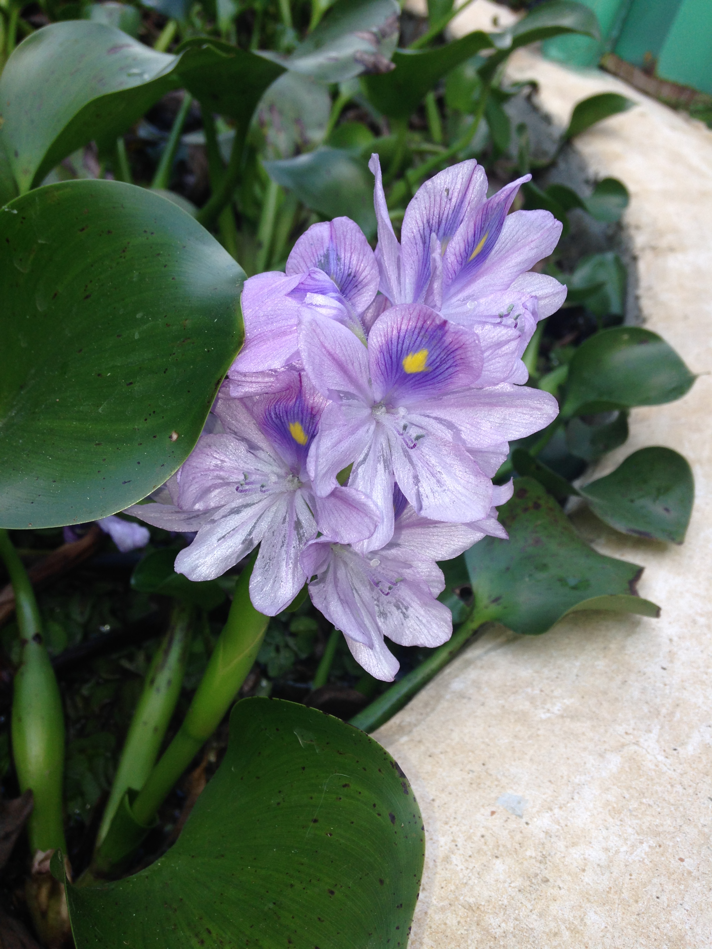 יקינטון המים בברכת נוי